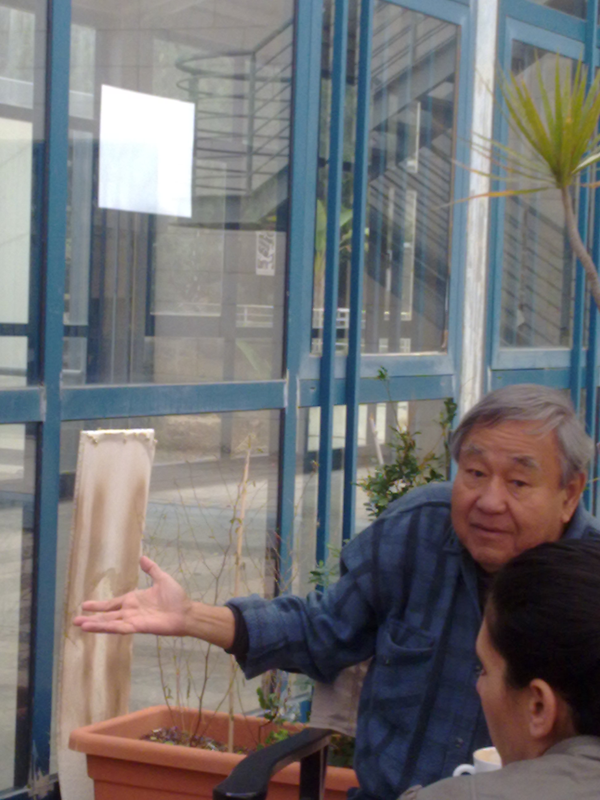 Hubert Lu Yon